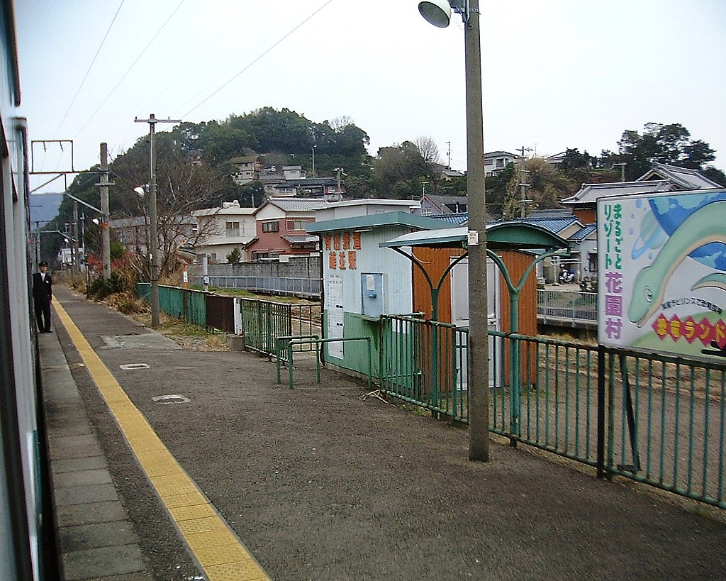 紀勢本線藤並駅 旧ja:有田鉄道改札口跡